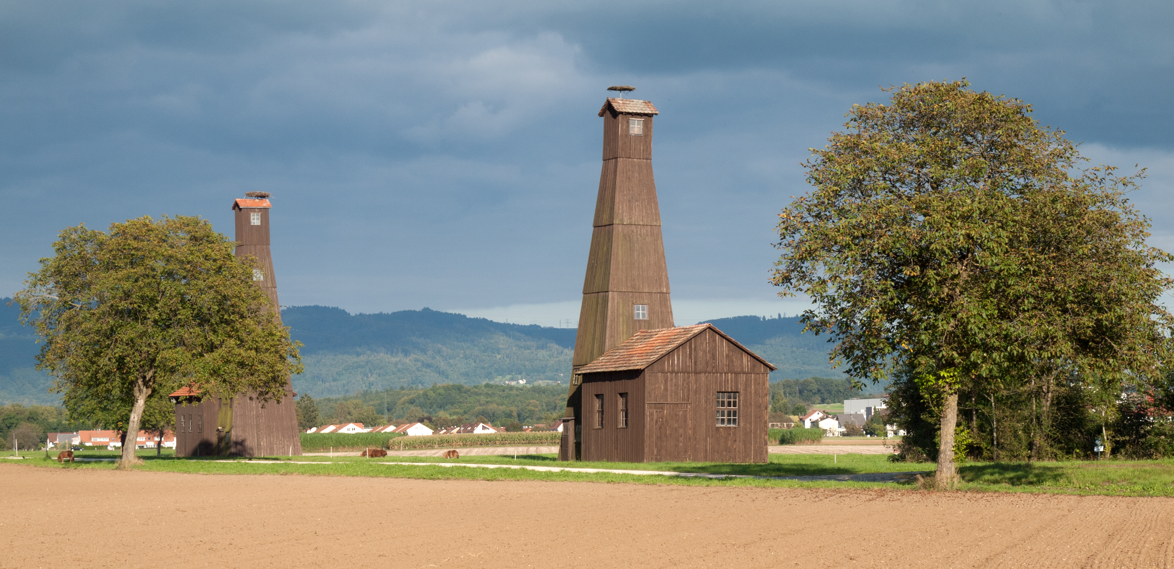 Die beiden Sohlebohrtürme der Saline Riburg. Sind als B-Objekte denkmalgeschützt. [1] Schweizerische Landeskordinaten: 630.000 267.000